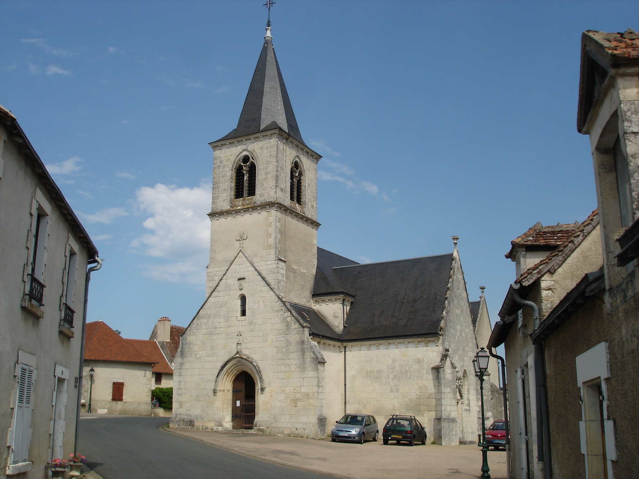 Concremiers (36) : L'église.